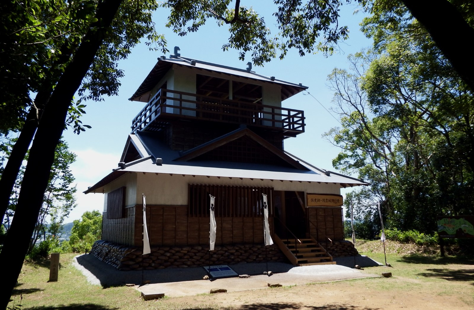 岡豊城跡の櫓